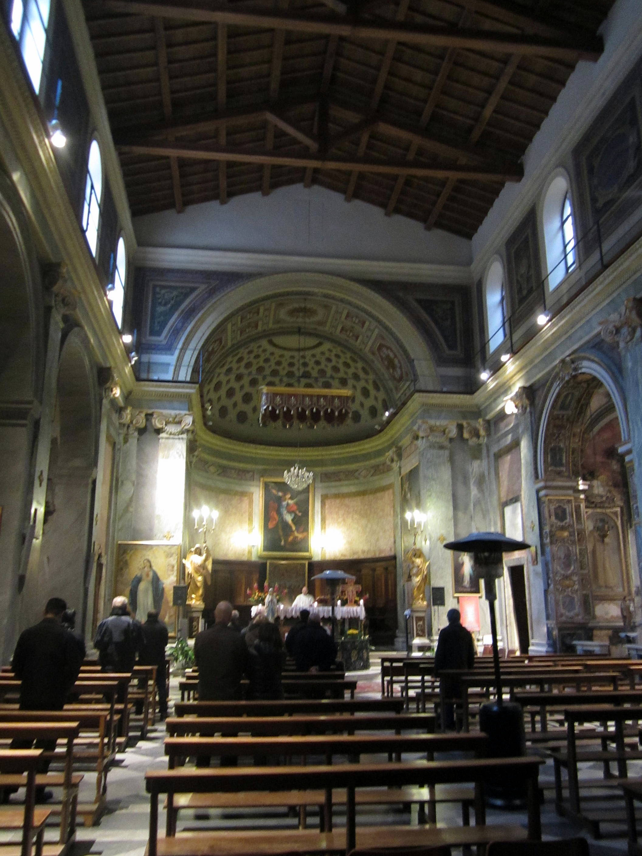 Interno della Chiesa di Sant'Angelo in Pescheria